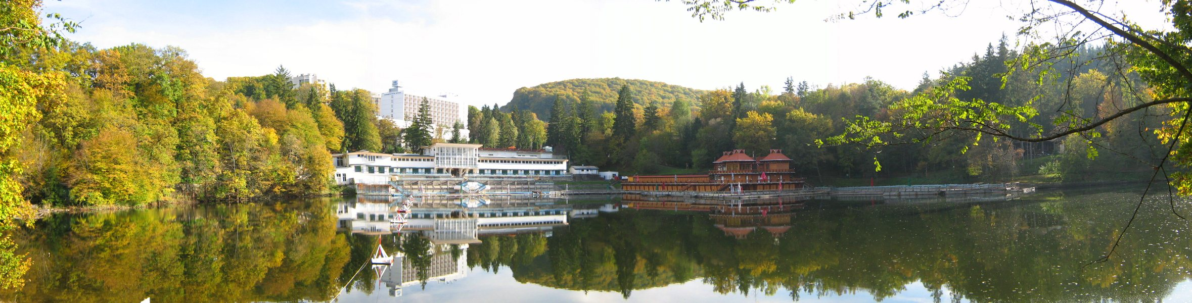 Sovata, Lacul Ursu